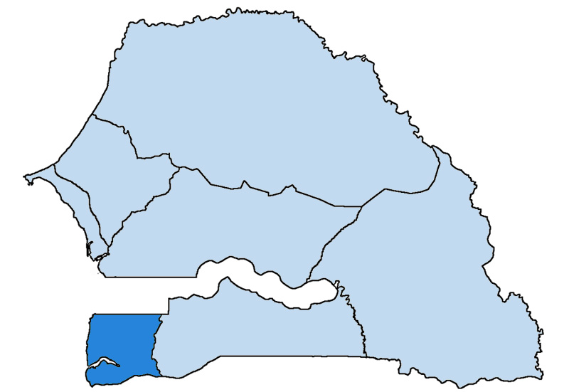 Mappa della diocesi cattolica di Ziguinchor, in Senegal. Anno 2009.